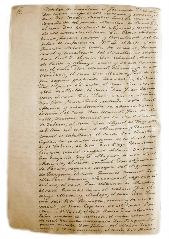 Documento relativo a la Revolución de mayo